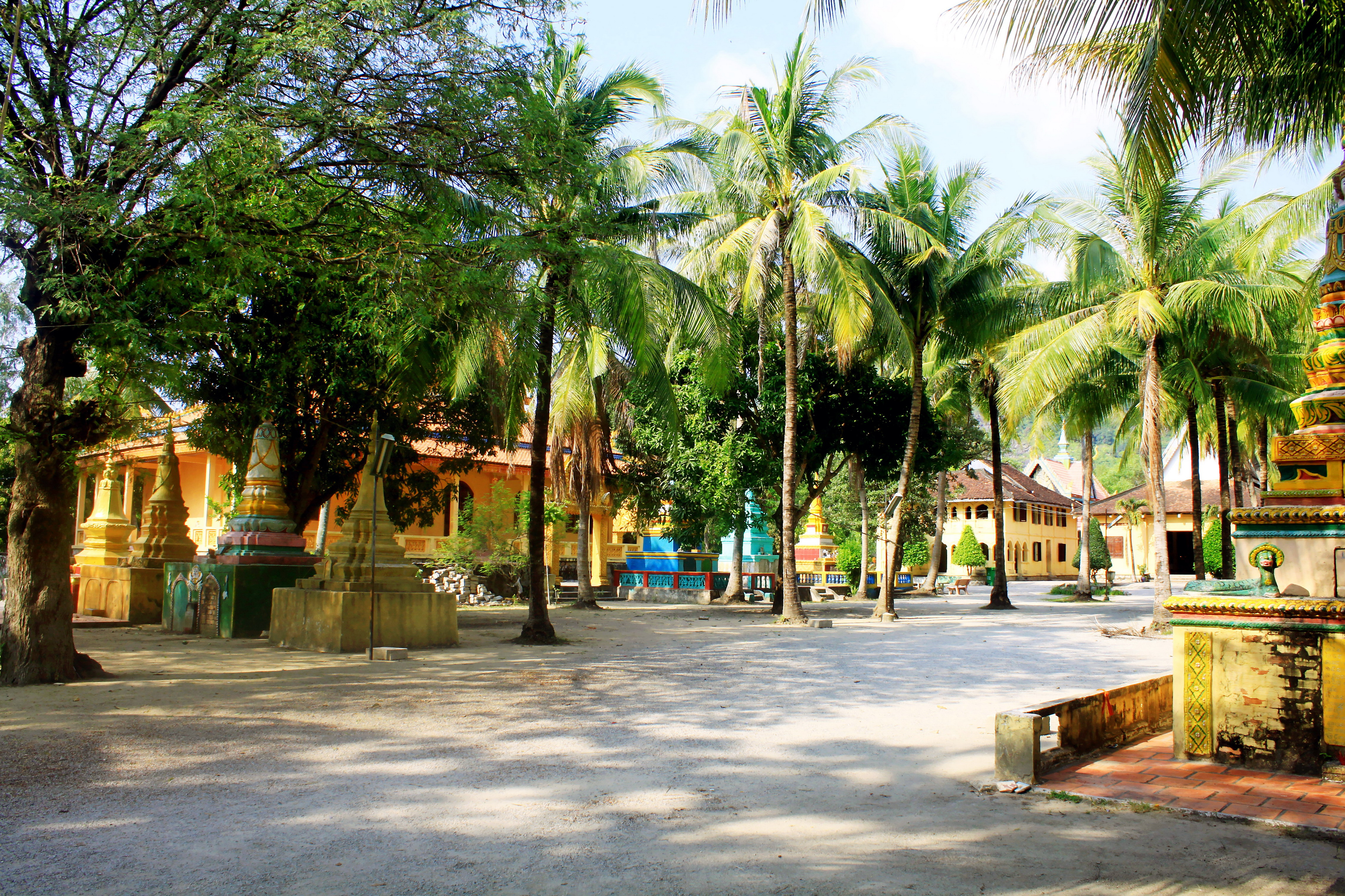 Trong khuôn viên chùa Poles của tộc người Khmer ở xã Cô Tô (Tri Tôn, An Giang, Việt Nam), được khởi dựng từ năm 1794 (được ghi ở cổng chùa).